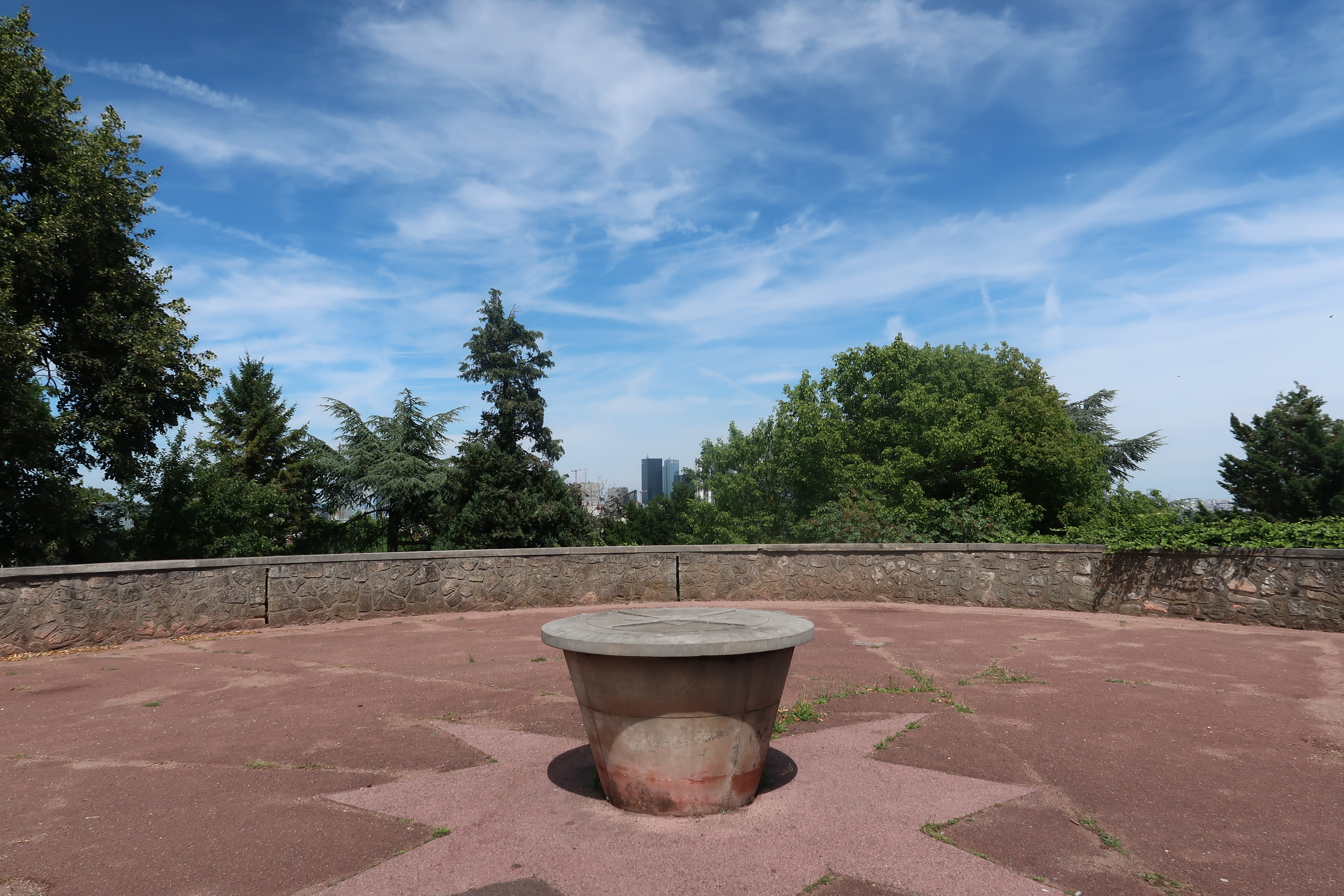 Table d'orientation à Suresnes (Hauts-de-Seine).